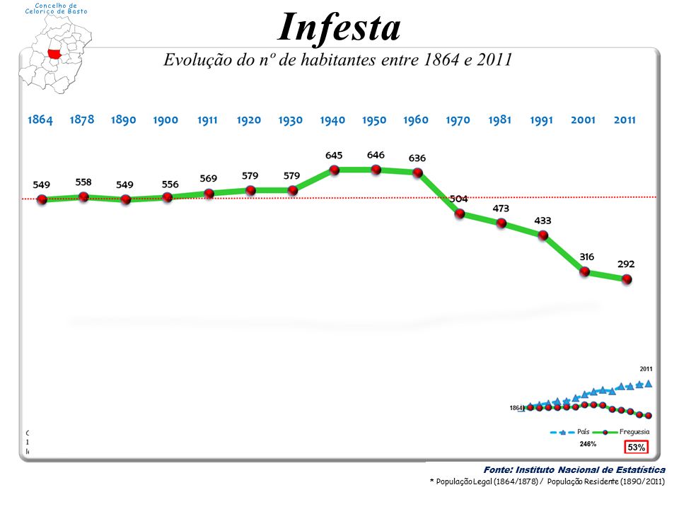 Censos 1864/2011